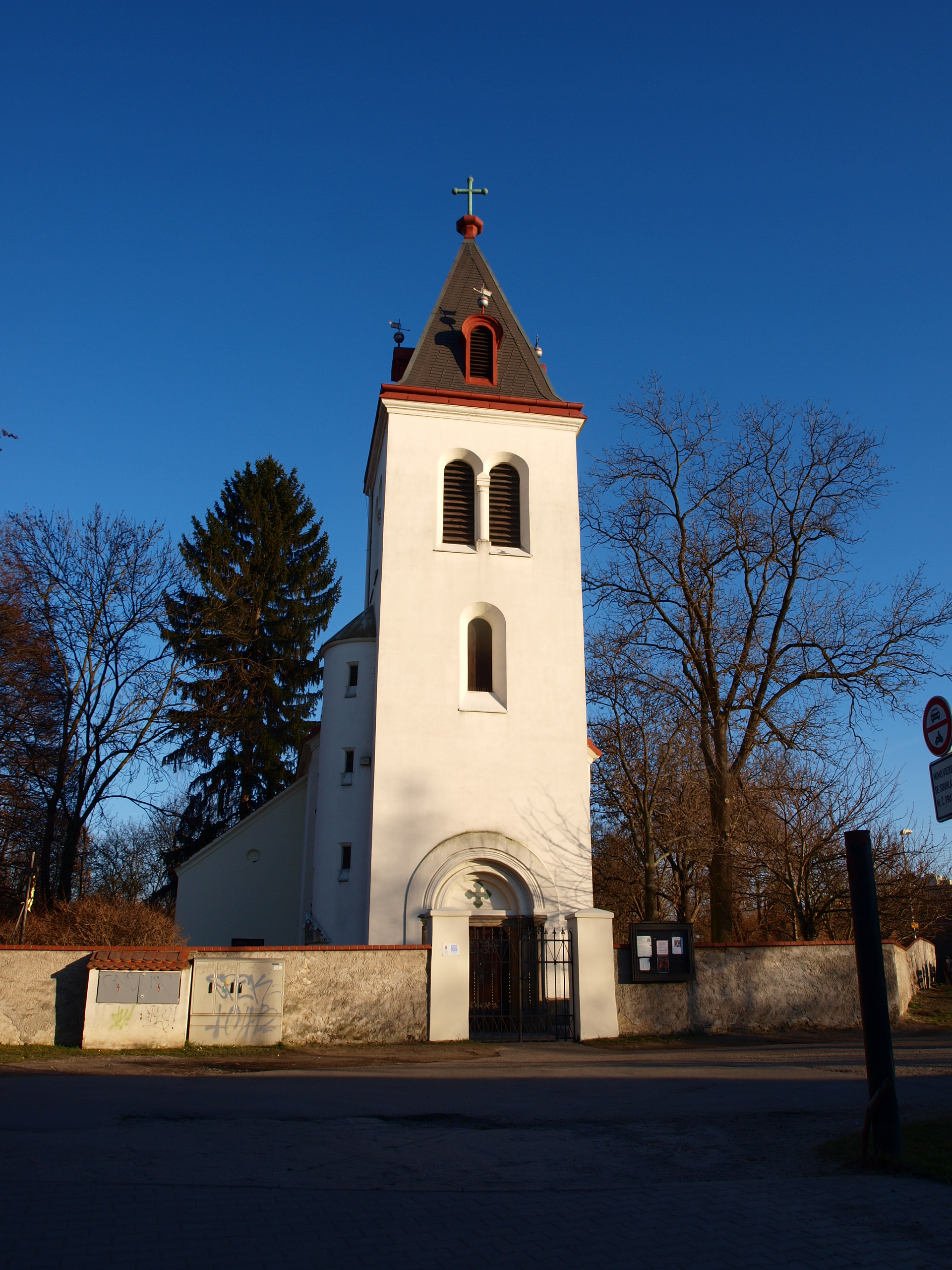 Kostel Narození Panny Marie (Záběhlice)